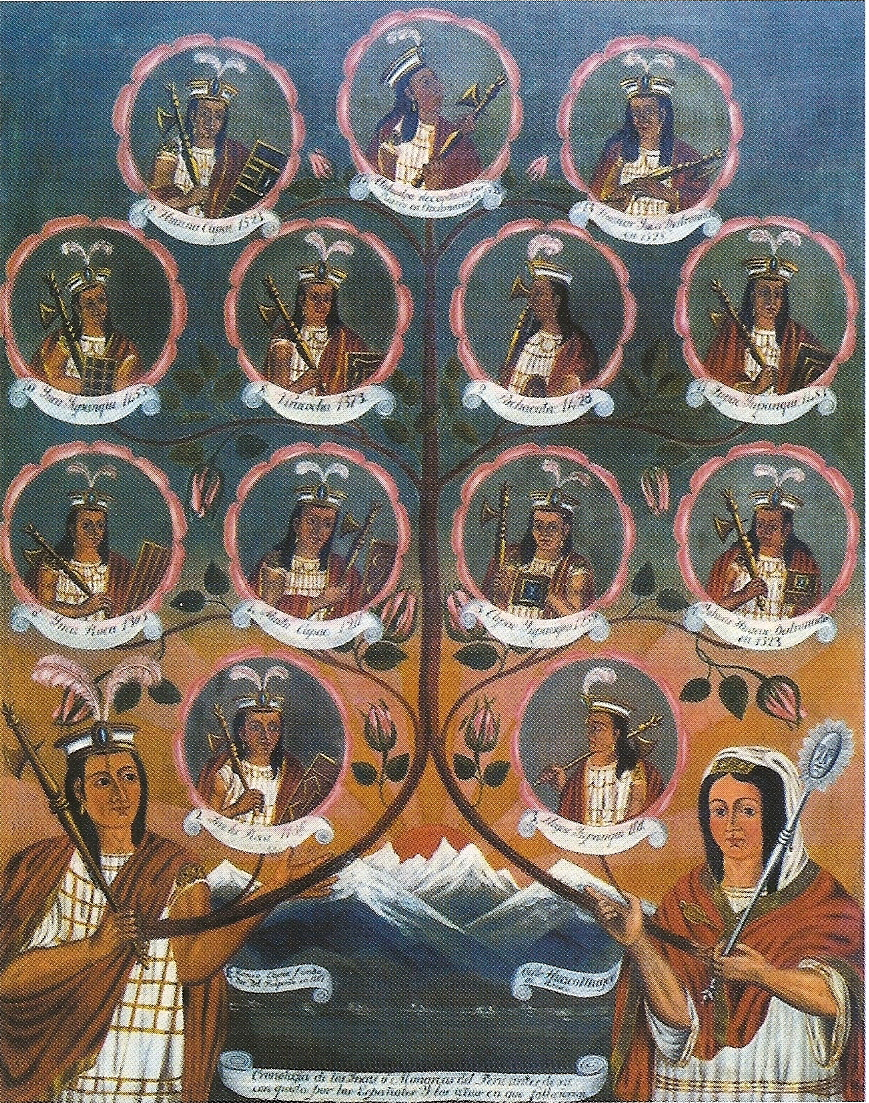 Cuadro cusqueño de artista desconocido (siglo XVII)